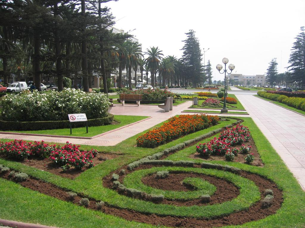 Le parc des villes jumelées, Mohammedia